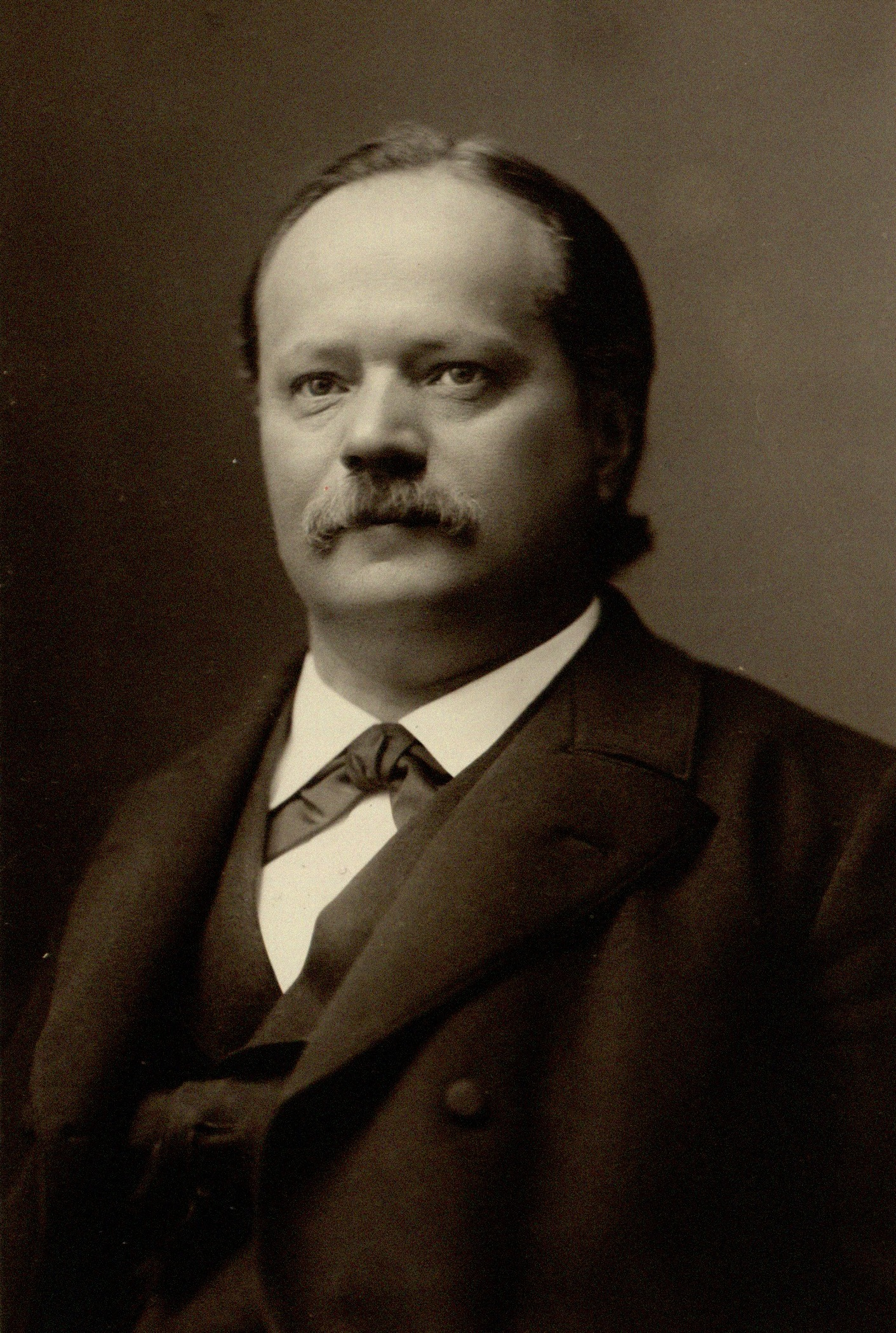 Lazarus Fuchs, Mathematiker, 1875–1884 Professor in Heidelberg